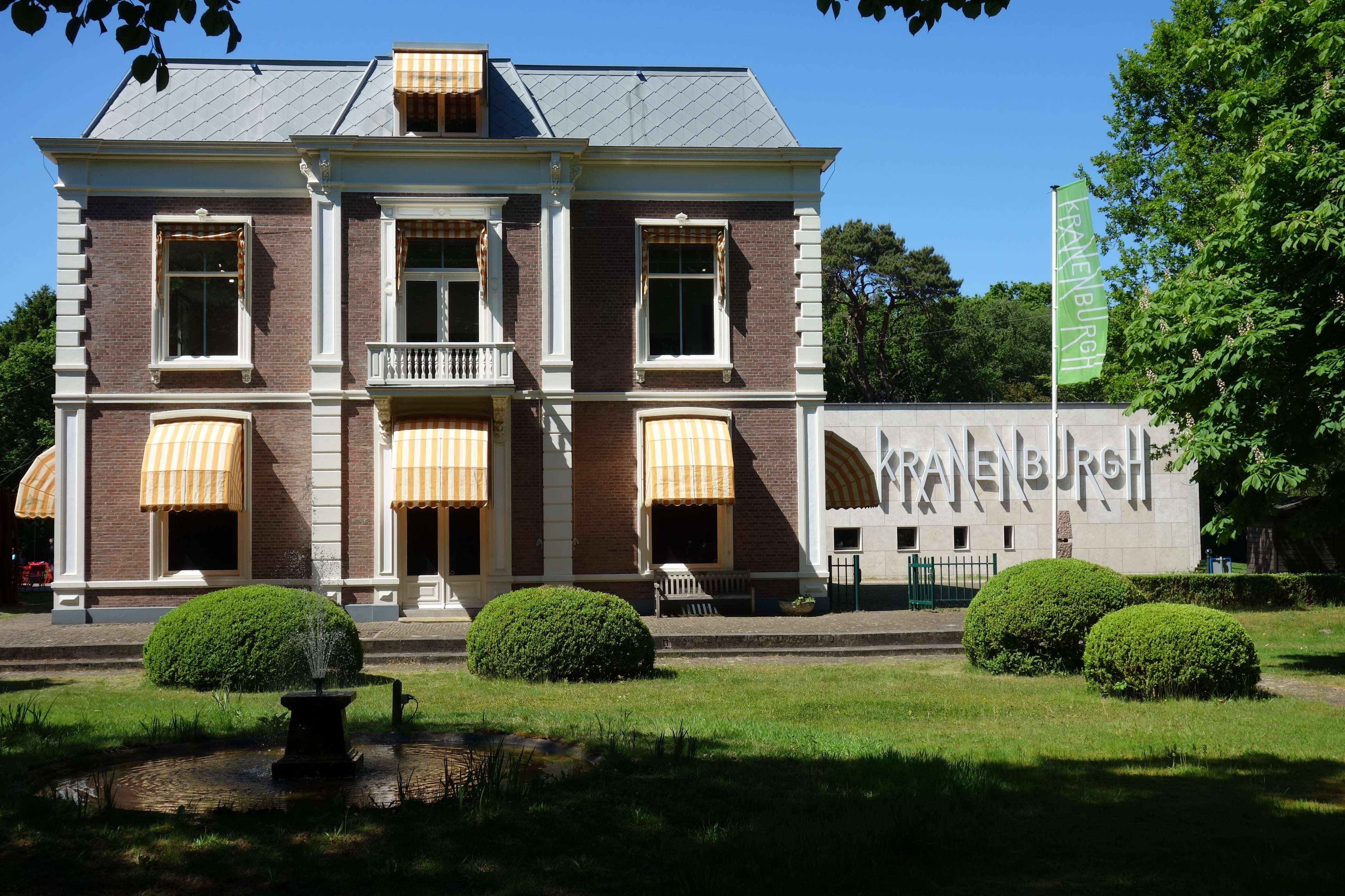 Overzicht van het hoofdgebouw van Museum Kranenburgh.